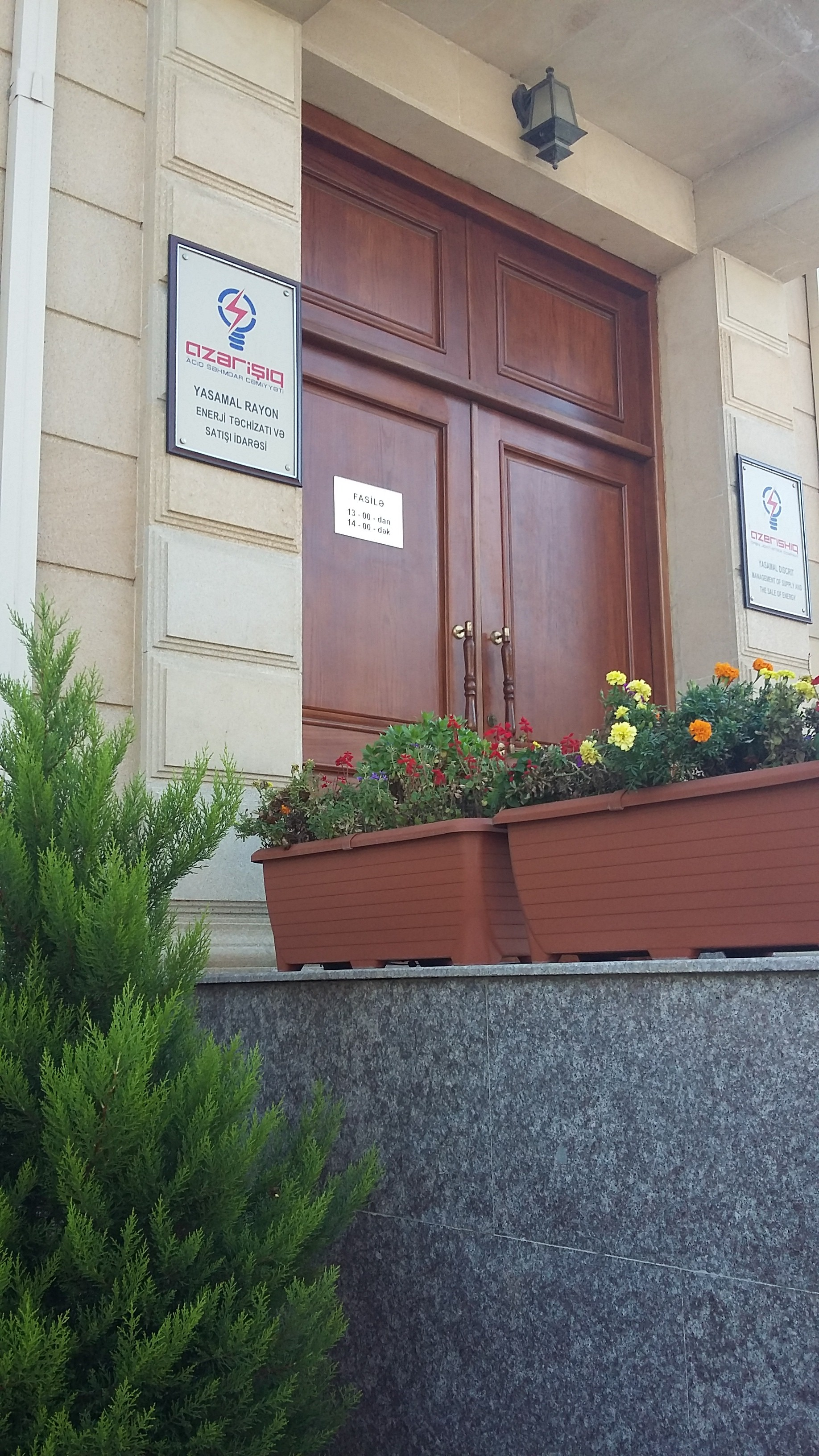 Azərişıq Yasamal